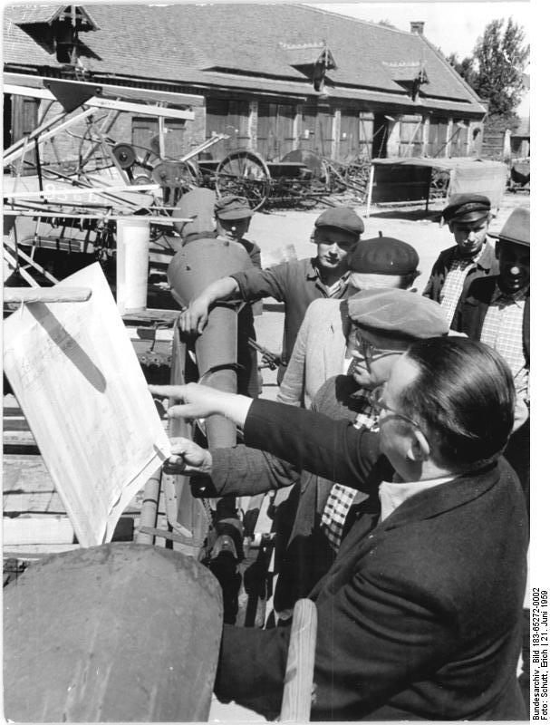 Seese, Besuch der MTS Zentralbild Schutt 21.6.1959 Tag der Erntebereitschaft in der MTS Seese-Krs.Calau. Die Brigaden 1 und 3 der MTS Seese führten am 20.6.1959 in der Station den Tag der Erntebereitschaft durch. Genossenschaftsbauern und andere Gäste waren erschienen und konnten feststellen, daß das Fließsystem gut vorbereitet ist und Verträge für Erntearbeiten mit 104 % von der MTS abgeschlossen wurden. UBz: Direktor Fiedler (Vordergrund) erläutert dem Vorsitzenden der LPG "Aufbau", Seese-Mlode (mit Sportmütze) eine an einem Mähbinder angebrachte Plantafel, auf der die Kapazität der MTS seines Bezirkes angegeben ist.